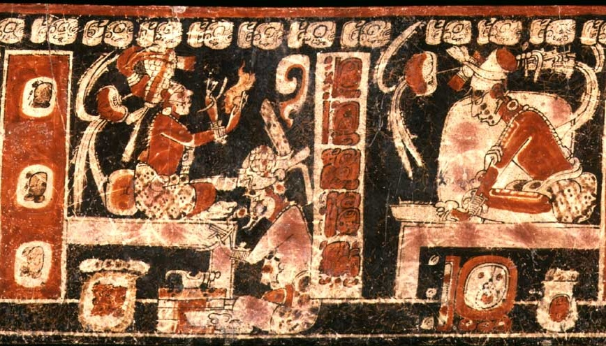 Jarrón maya con la imagen de Hunahpú e Ixbalanqué, los Héroes Gemelos.